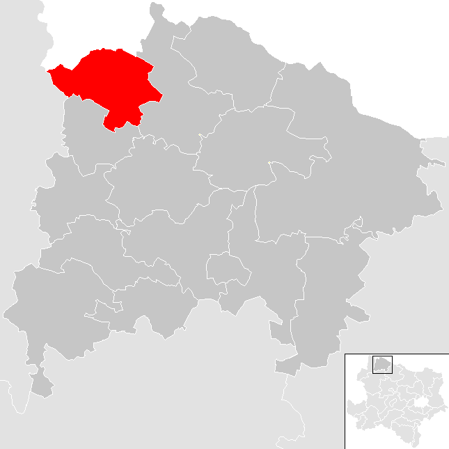 Bezirk Waidhofen an der Thaya